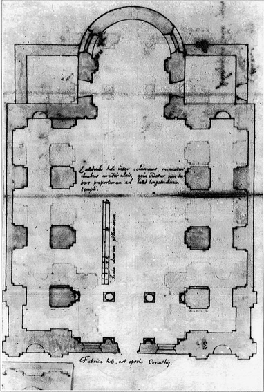 Беларуская (тарашкевіца): Менск. Праектавы плян касьцёла Імя Найсьвяцейшай Панны Марыі